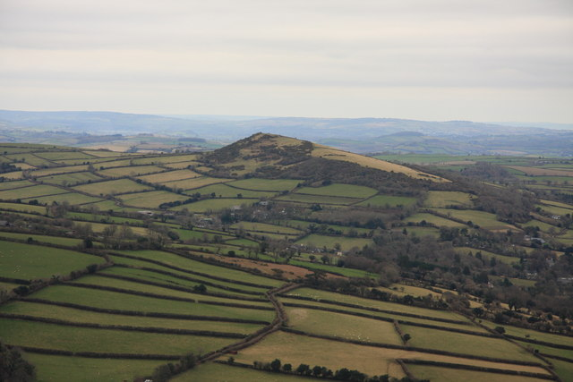 Brent Hill